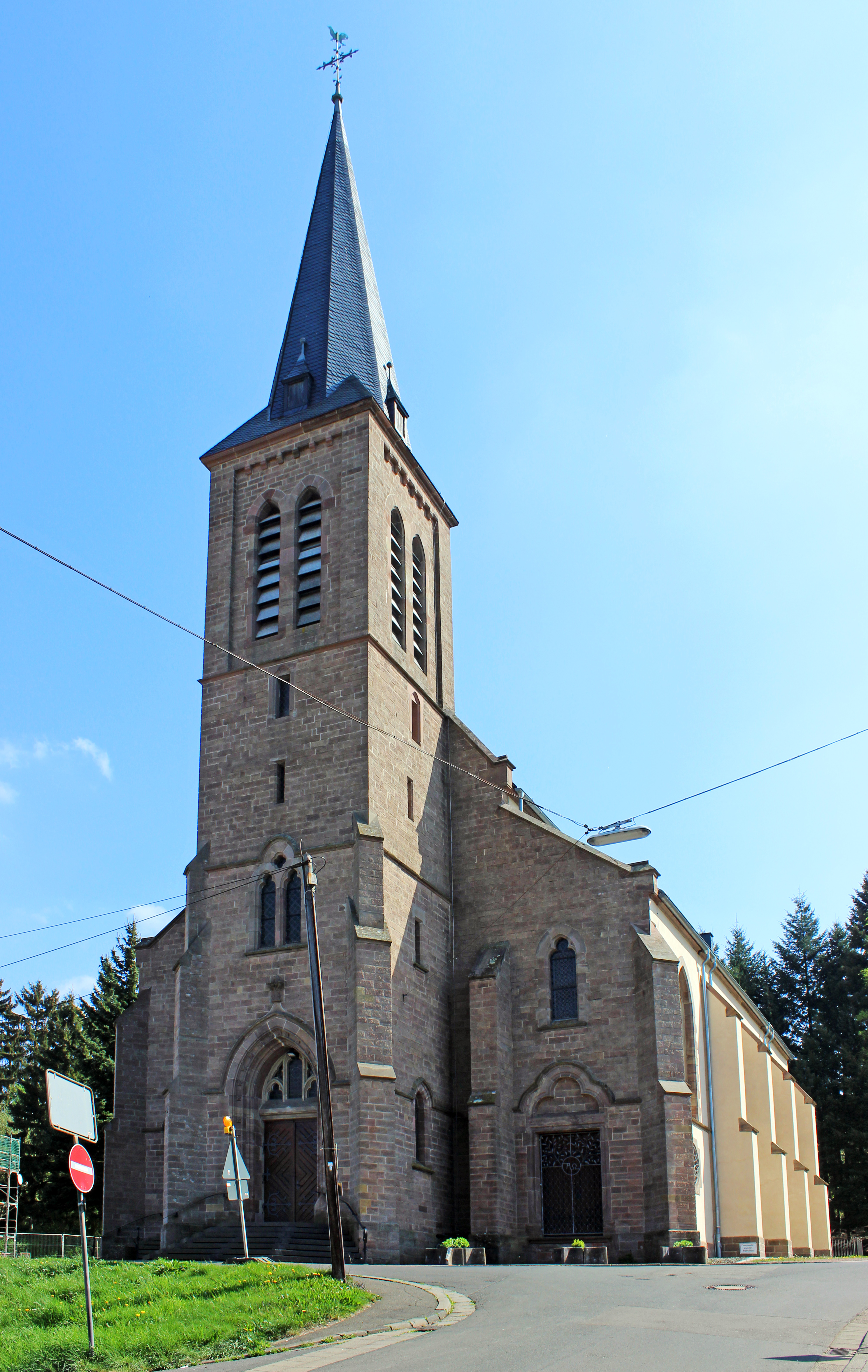 Die katholische Pfarrkirche Heilige Familie in Hangard, einem Stadtteil von Neunkirchen/Saar.